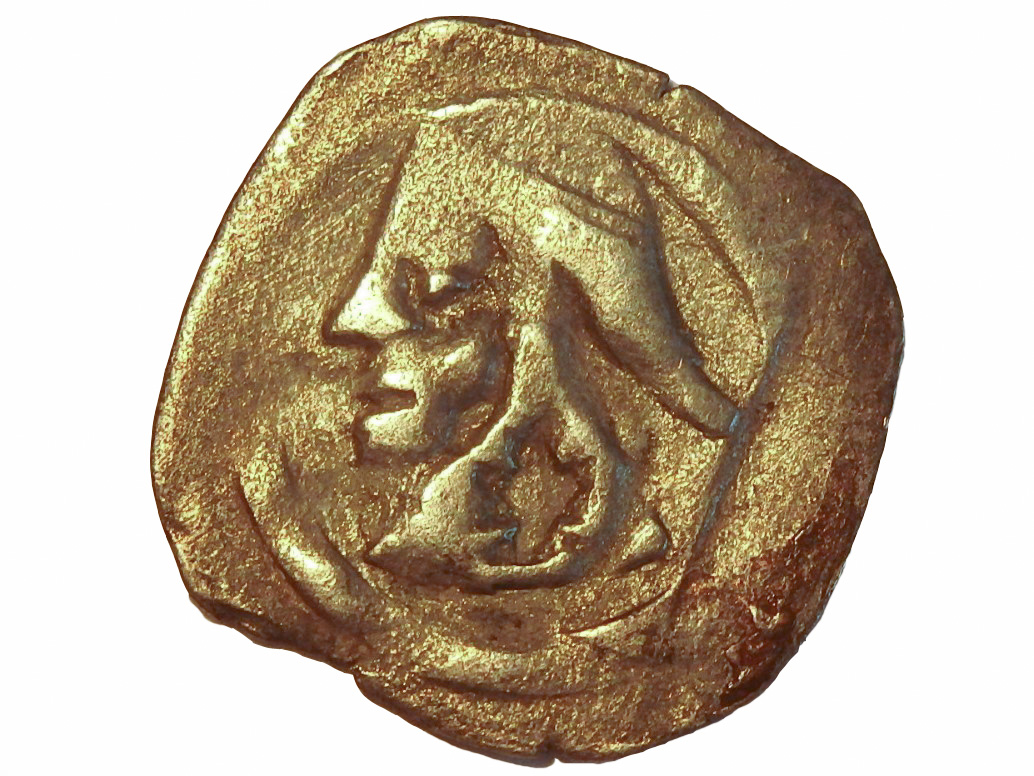 Münchner Pfennig mit Mönch, z.Zt. Stefans II. (1349-75)